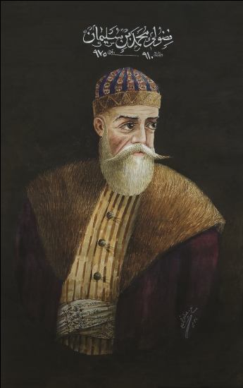 Portrait of Azerbaijani poet Fuzuli.